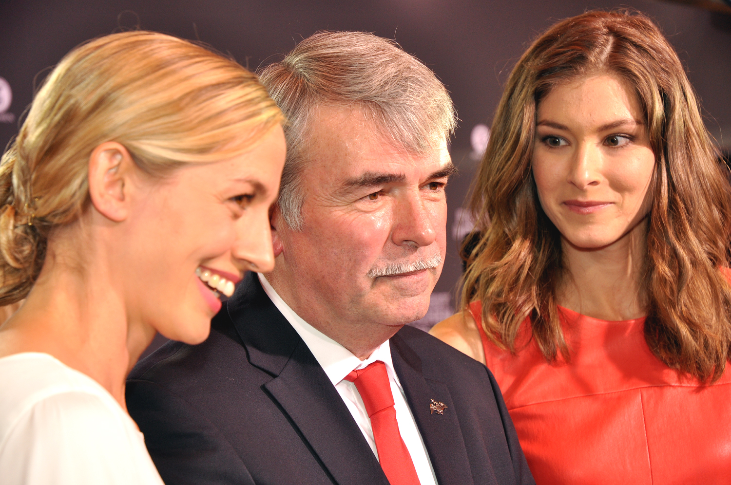 Gustl Mollath mit Leonie Stade (rechts) und Annika Blendl bei der Eröffnungs-Party des 33. Münchner Filmfestes im Hotel Bayerischer Hof